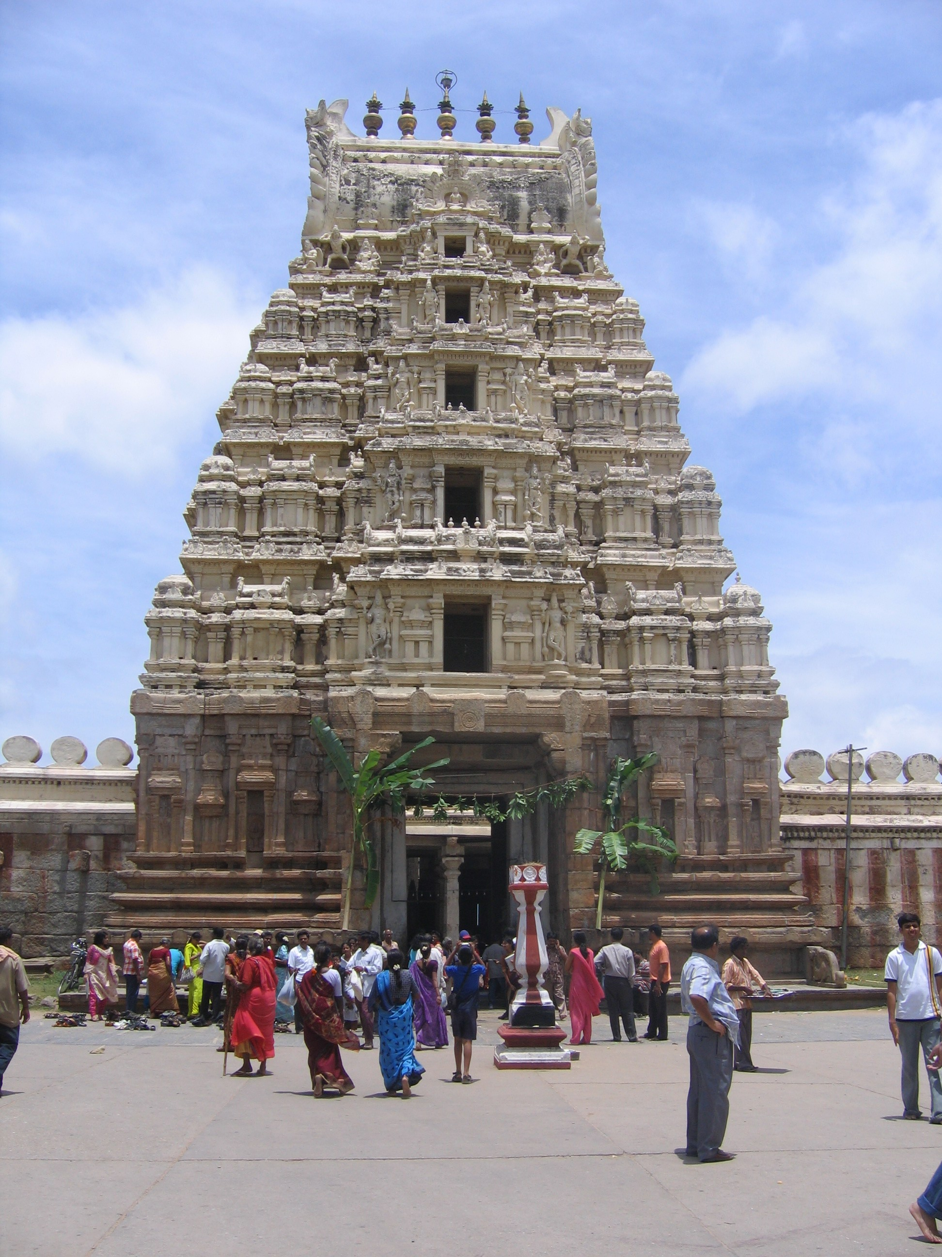 ശ്രീരങ്കപട്ടണത്തിലെ പ്രശസ്തമായ ശ്രീ രങ്കനാഥസ്വാമി ക്ഷേത്രം.